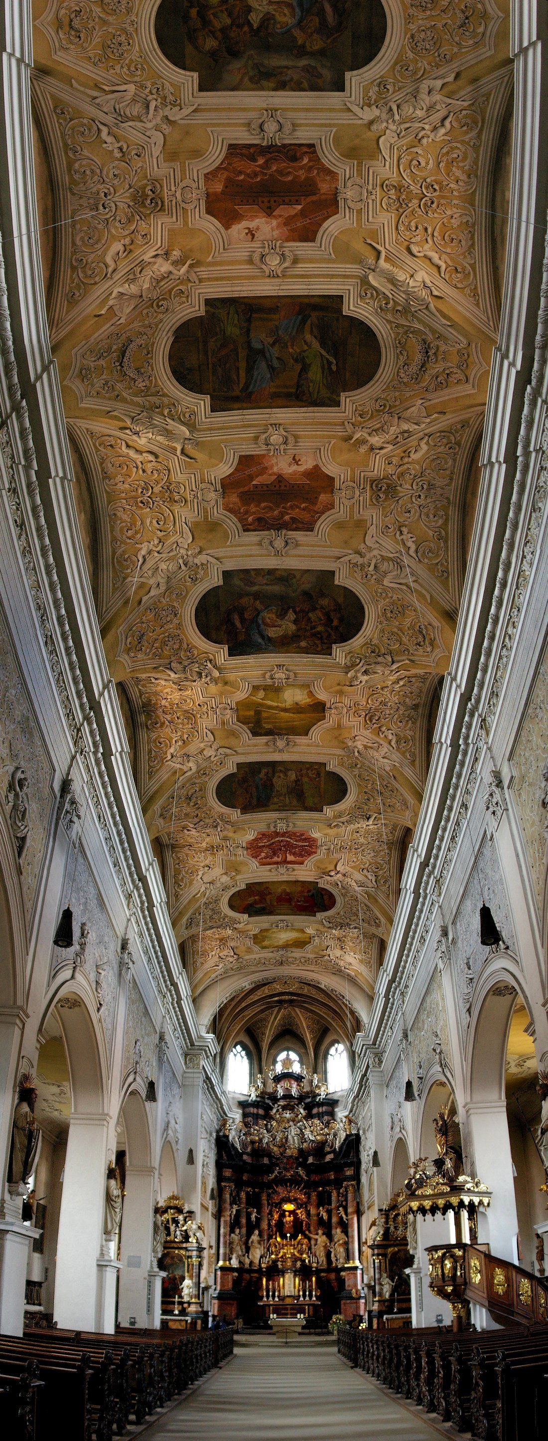 Bamberg - Obere Pfarre - Mittelschiff ( Vertikalpanorama